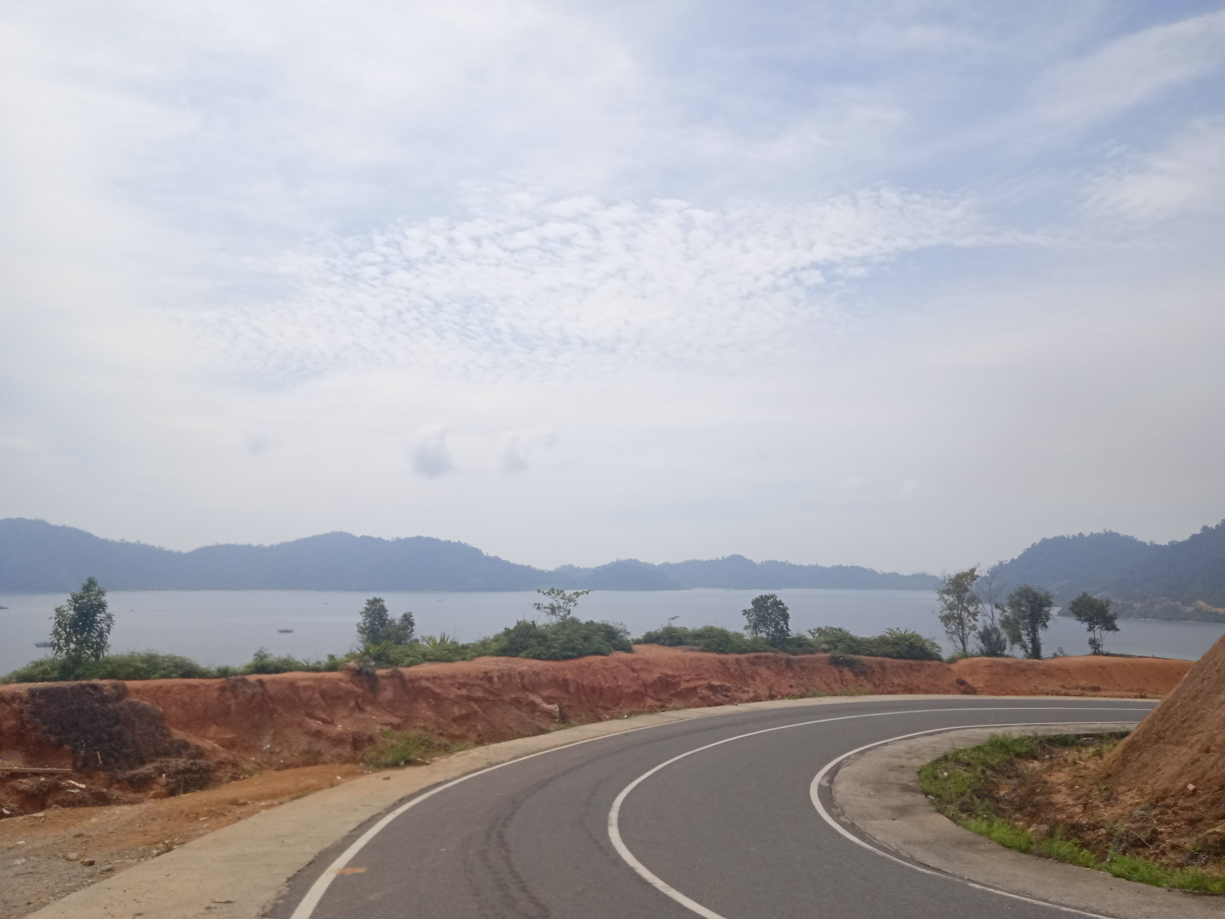 Kawasan Wisata Mandeh, Pesisir Selatan